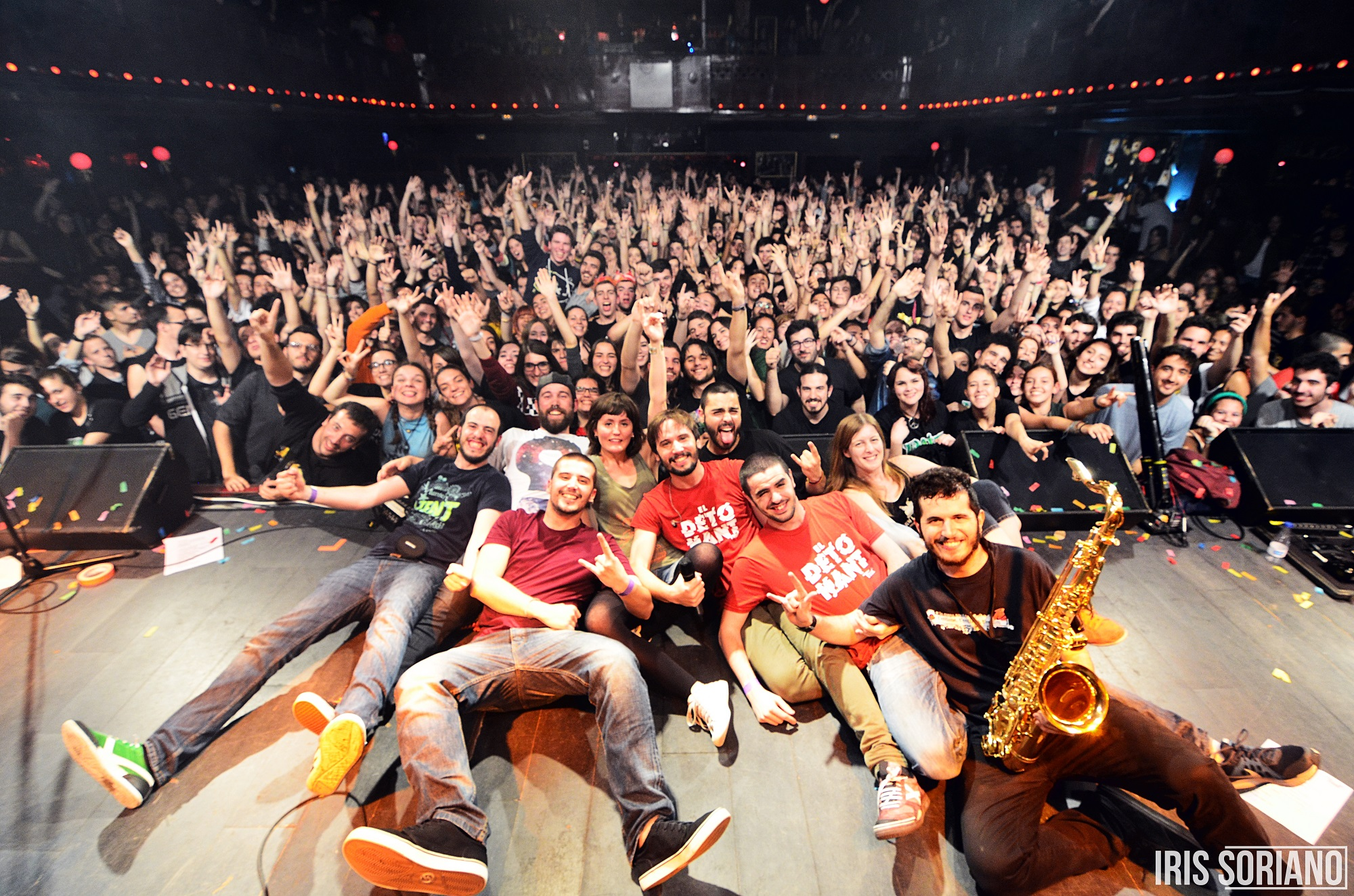 Foto final del concert de Trast a l'Apolo (21/04/16).